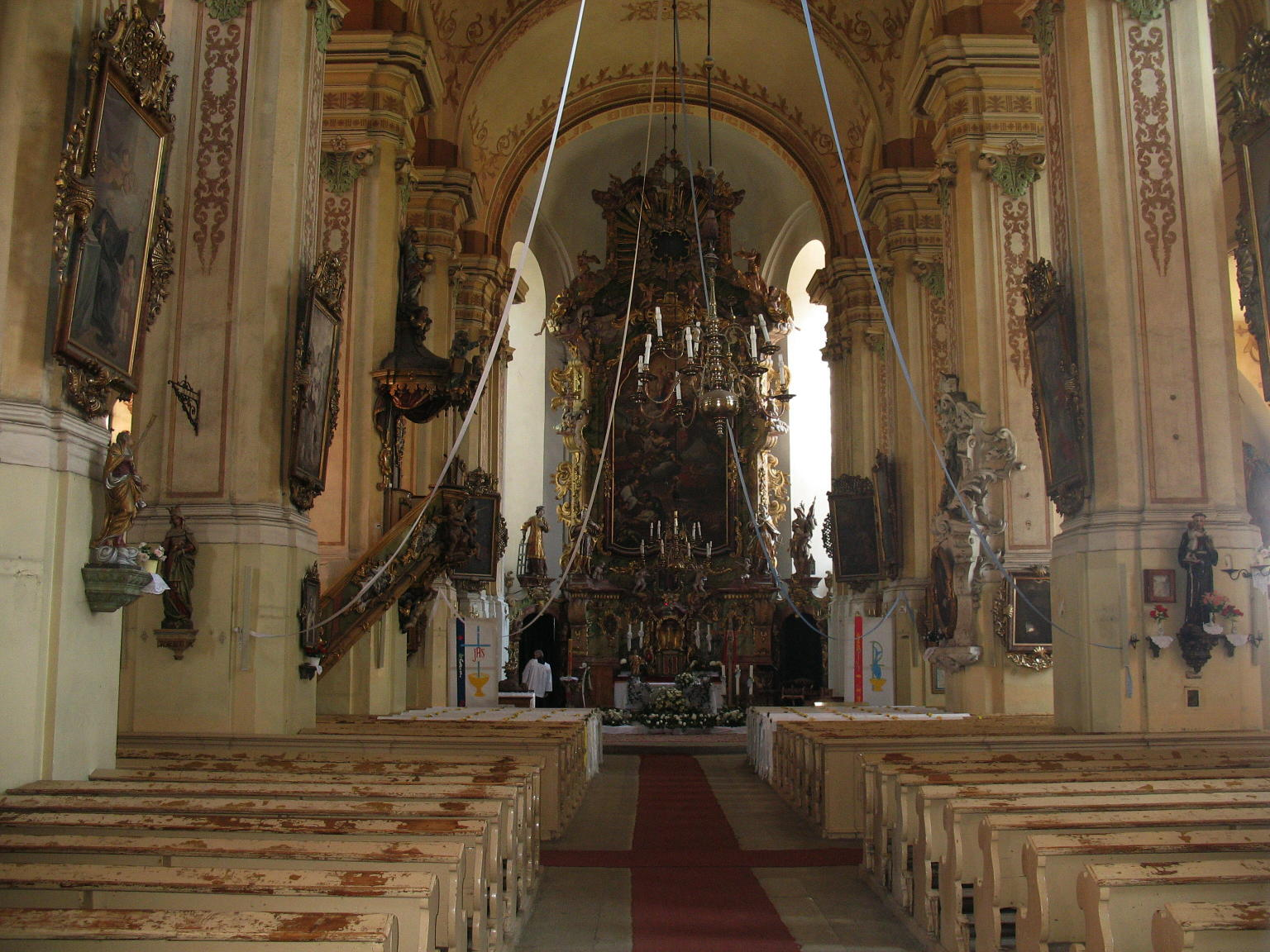 Lubawka (Liebau), Inneres der Pfarrkirche